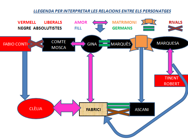 He realitzat un esquema per comprendre de manera esquemàtica les relacions entre els personatges identificant absolutistes, liberals, relacions d'amor, matrimoni, germans, rivalitat i filiació.